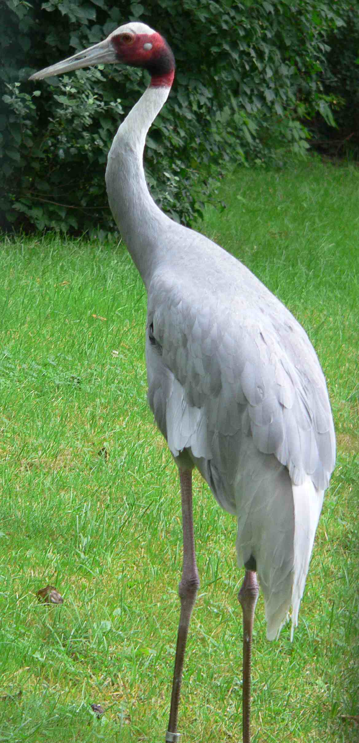 Grus